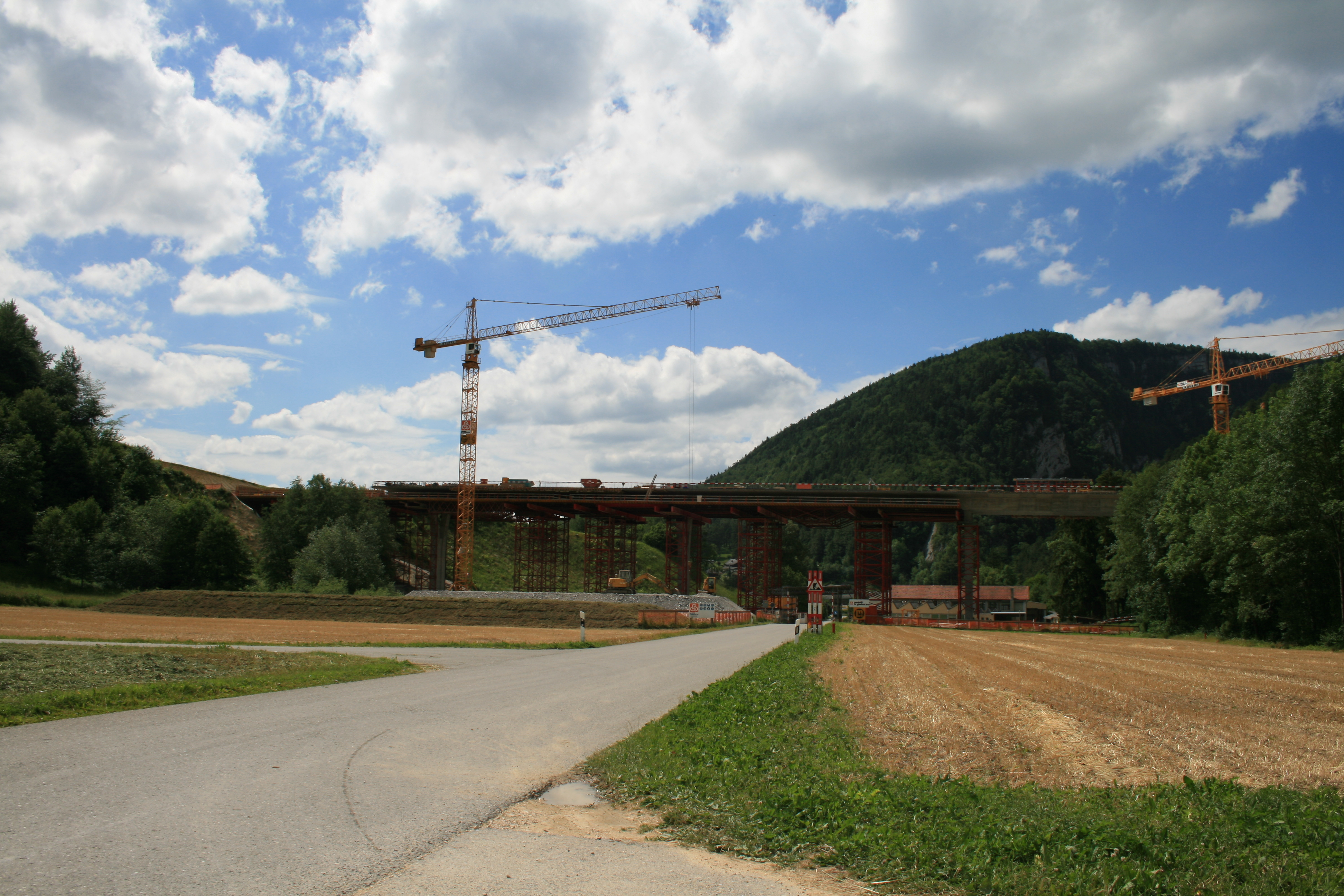 In Bau befindliche Autobahnbrücke in der Gemeinde Court BE, Schweiz